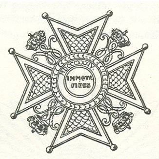 Borstkruis_van_de_Orde_van_Henderik_de_Leeuw, Brunswijk 1834-1918